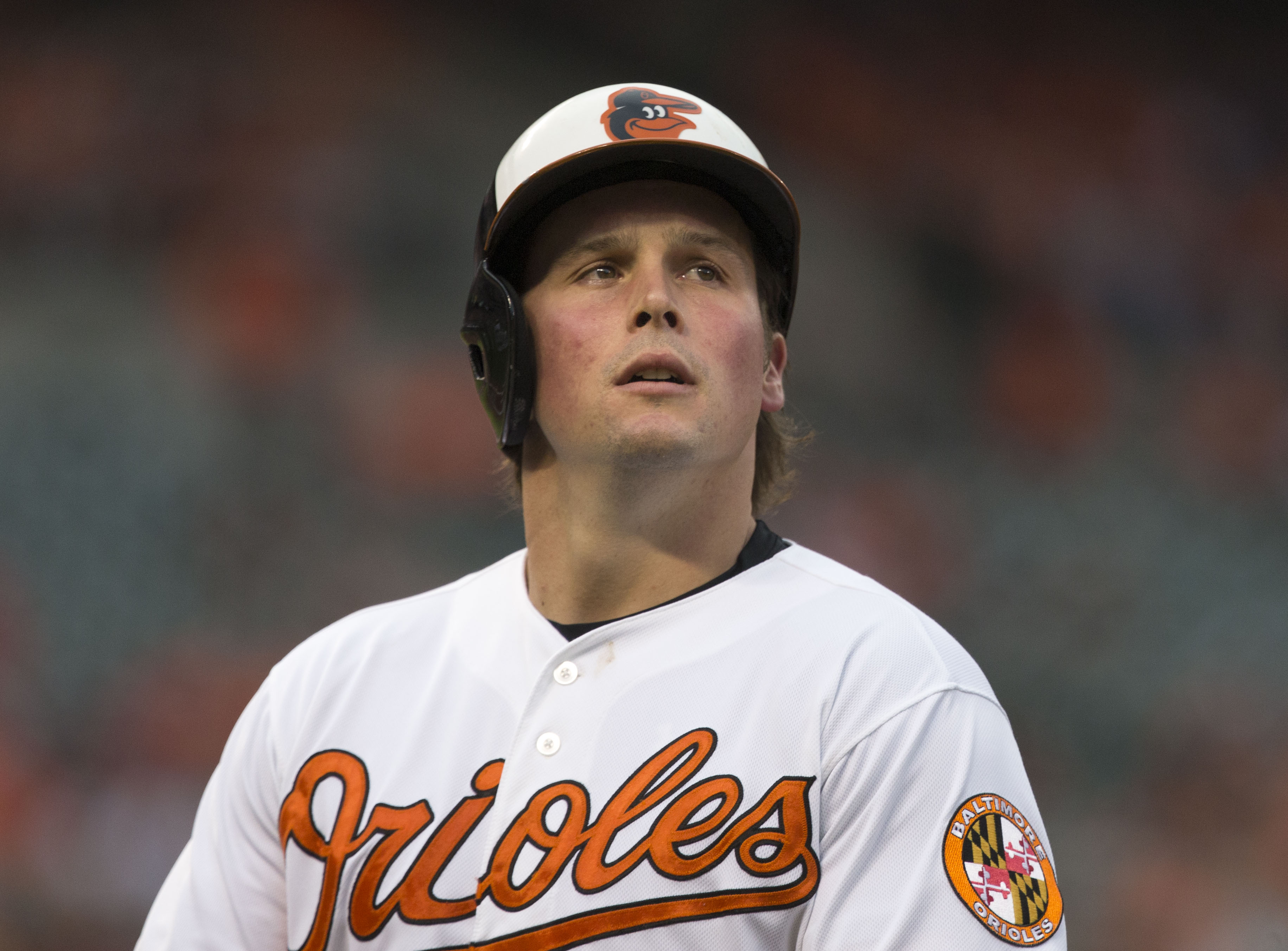 Travis Snider